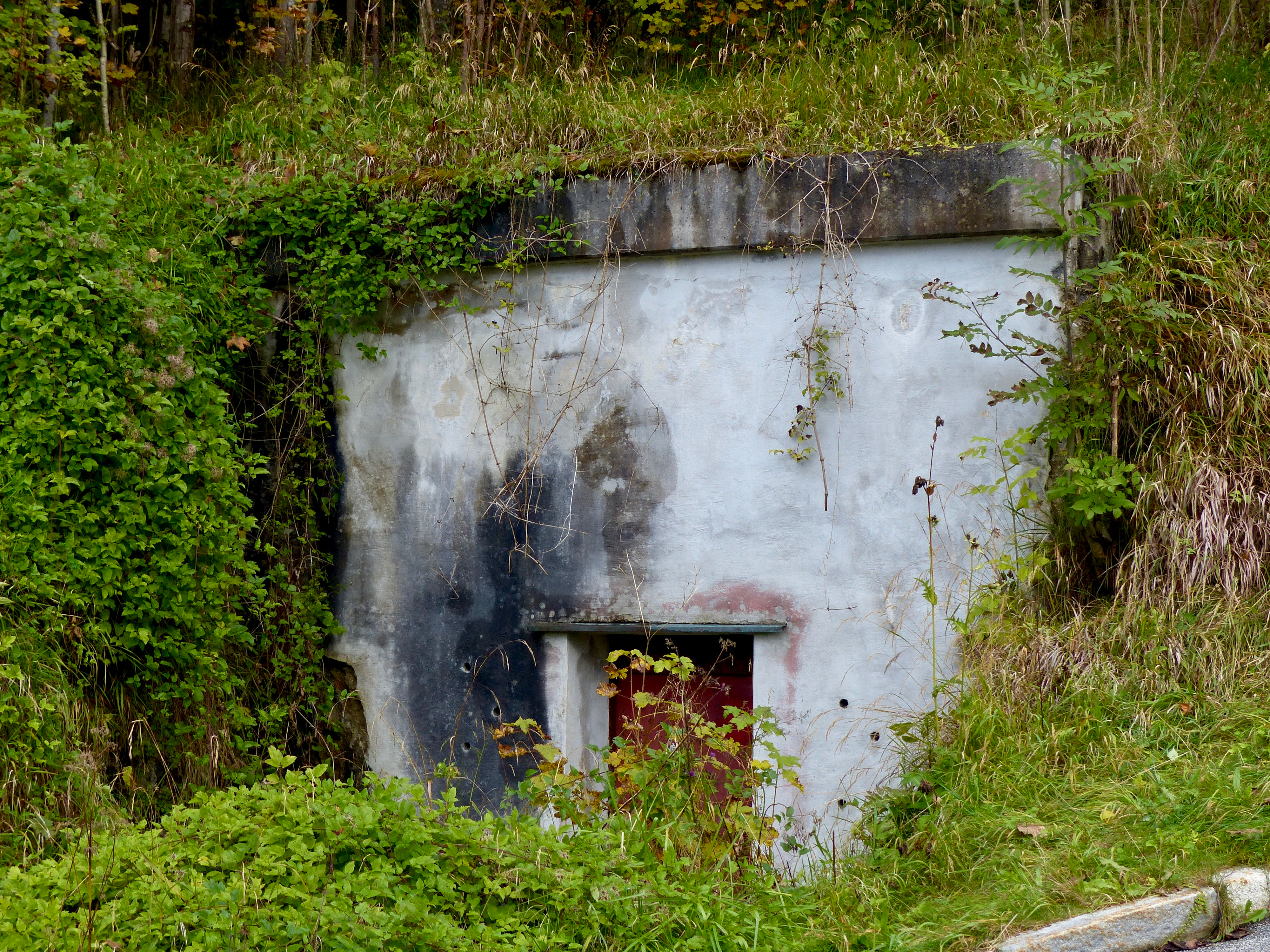 Bunkereingang Obersalzberg, nahe dem Hotel zum TürkenThis is a photograph of an architectural monument.